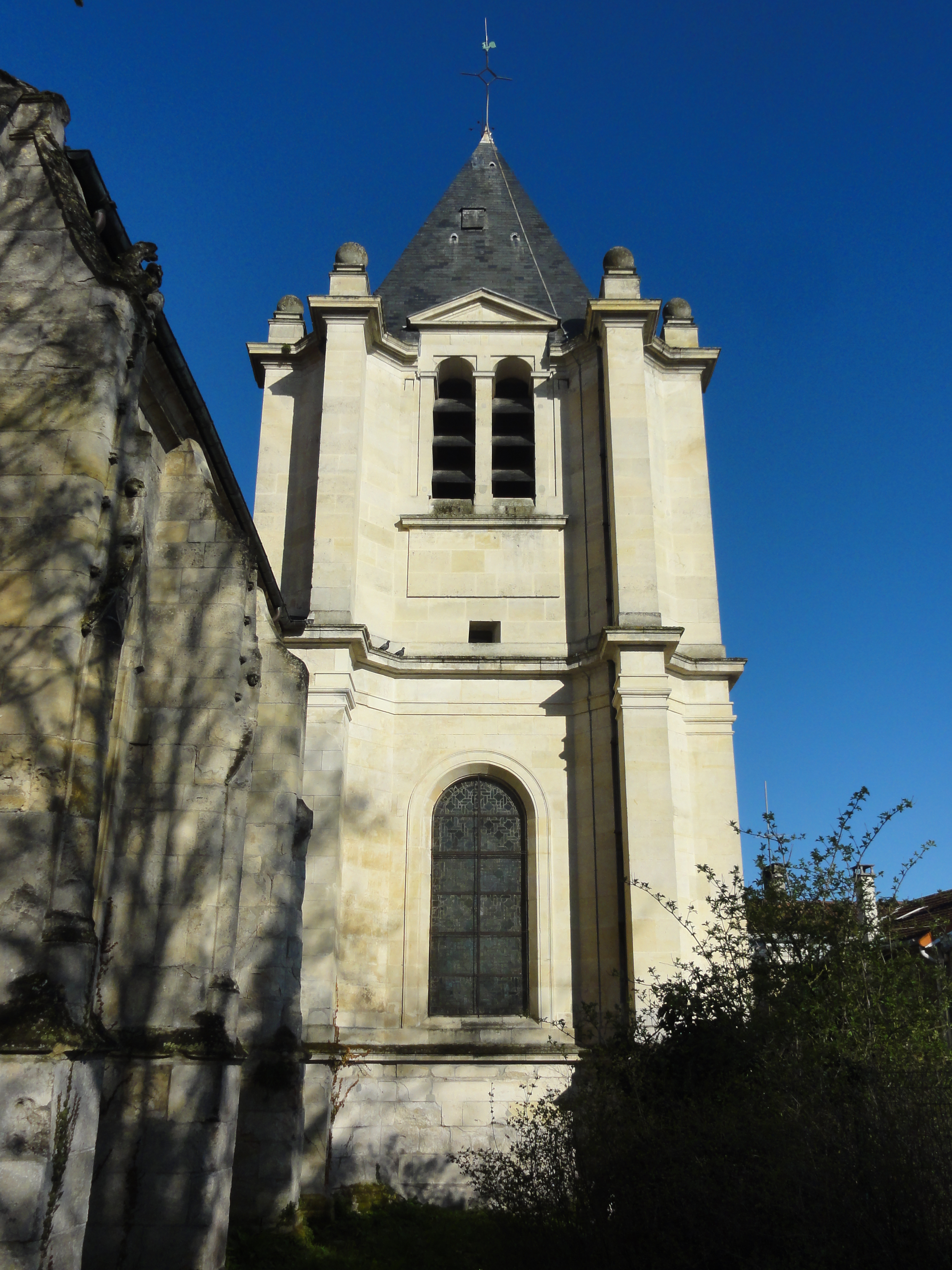 Église Saint-Acceul d'Écouen - voir titre.